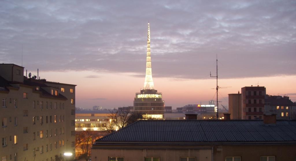 Von mir, Peter Stadler (Benutzer:Gnosos) fotografiert und hochgeladen. Messe Wien, Aufnahme aus der Engerthstrasse, 1020 Wien.